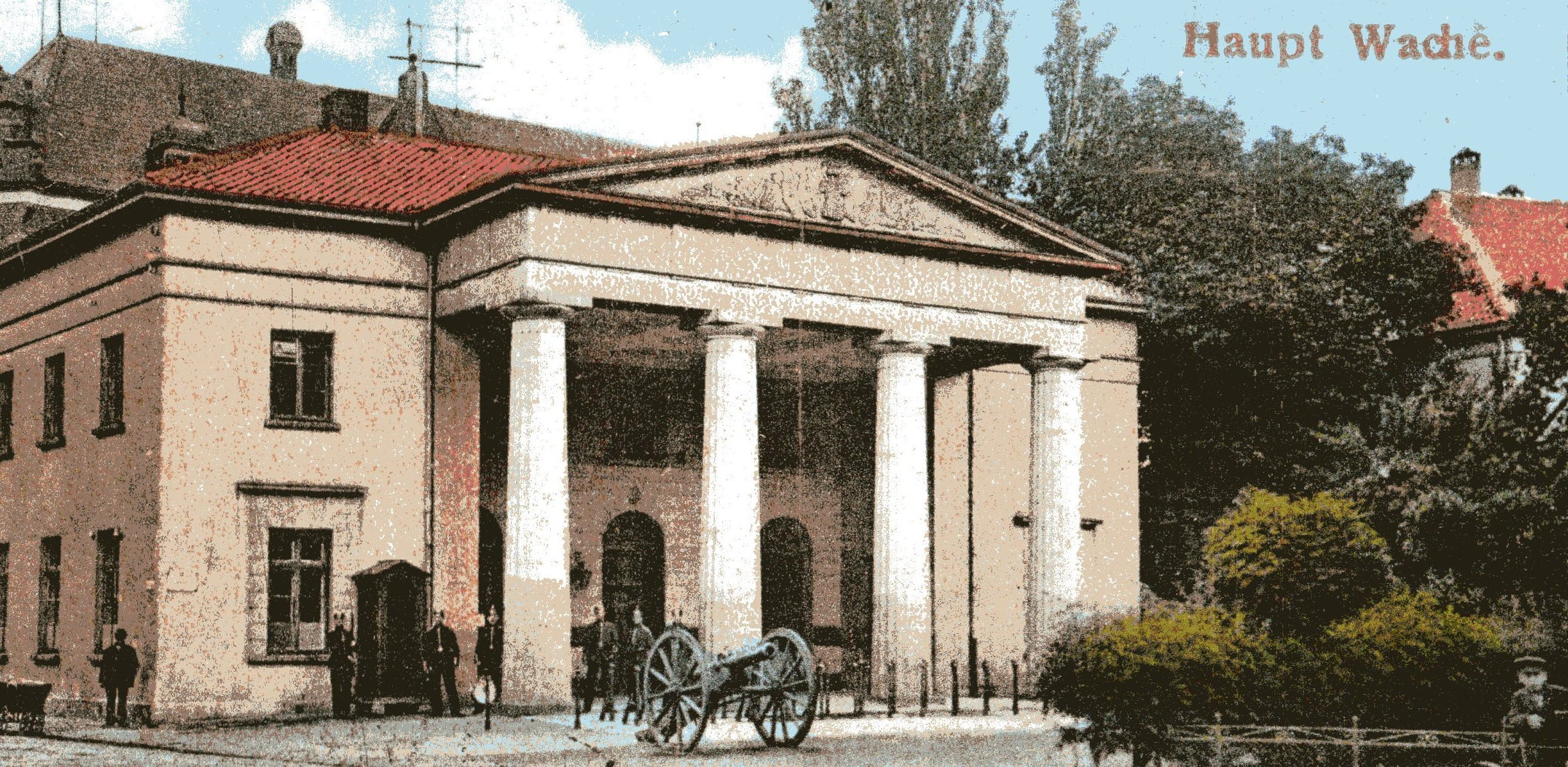 Schloßwache Oldenburg um 1914 oder davor. Ausschnitt aus einer kolorierten Postkarte, aus Oldenburg abgeschickt an den Musketier Johann Wiechmann (1873-1942), Ersatzbataillon des Reserve-Infanterie-Regiments 77 (RIR 77) in Hildesheim am 13. März 1917.